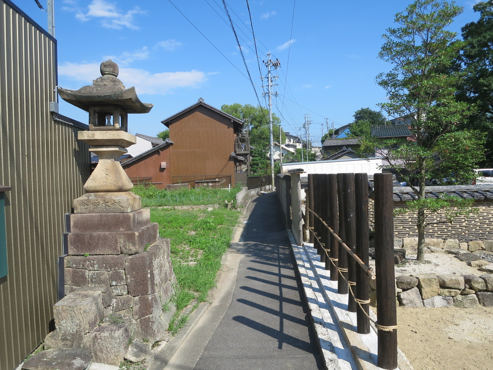 師範通りの常夜灯（岡崎市）